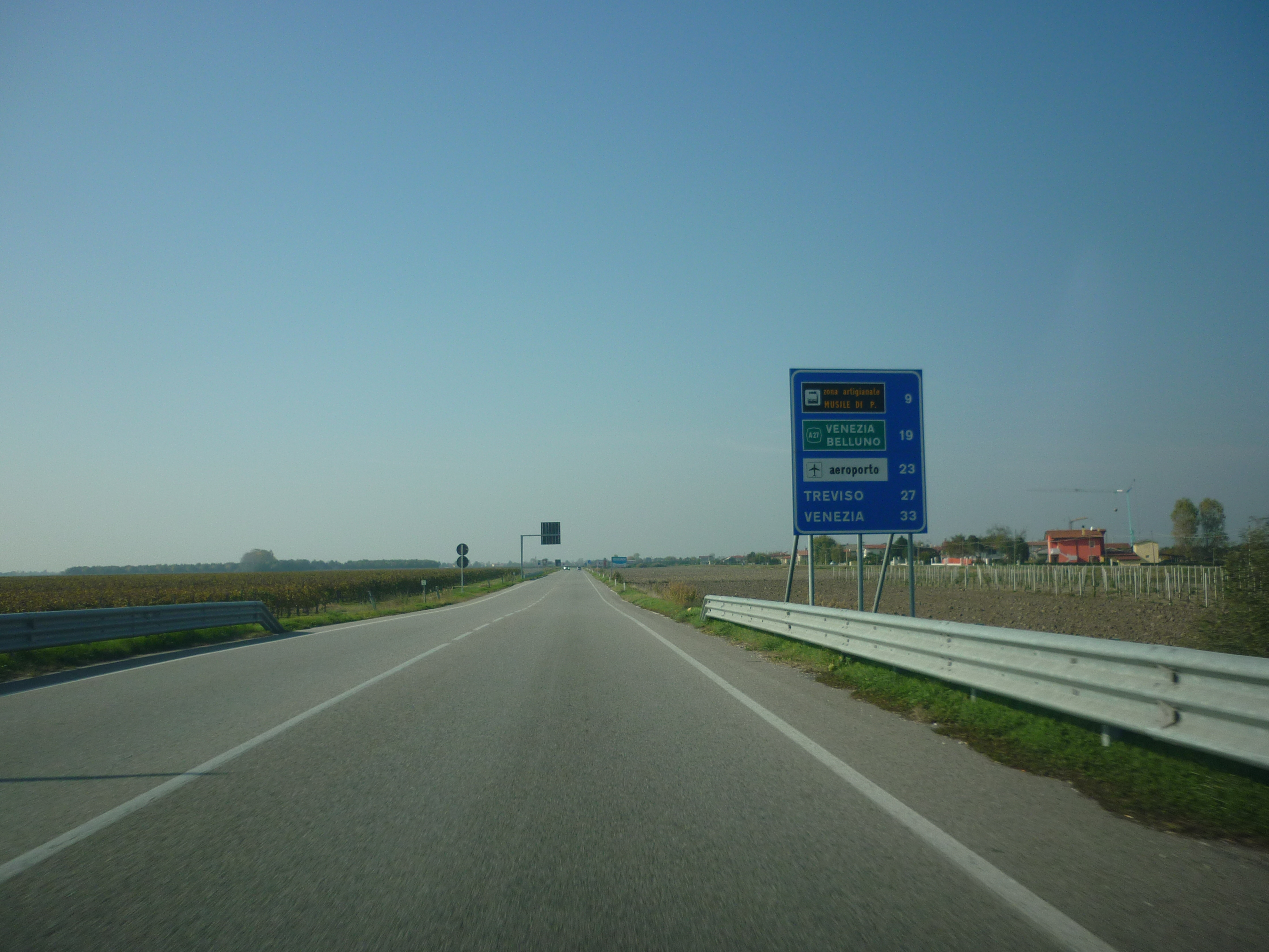 L'inizio della strada statale 14 var/A "Variante di San Donà di Piave".